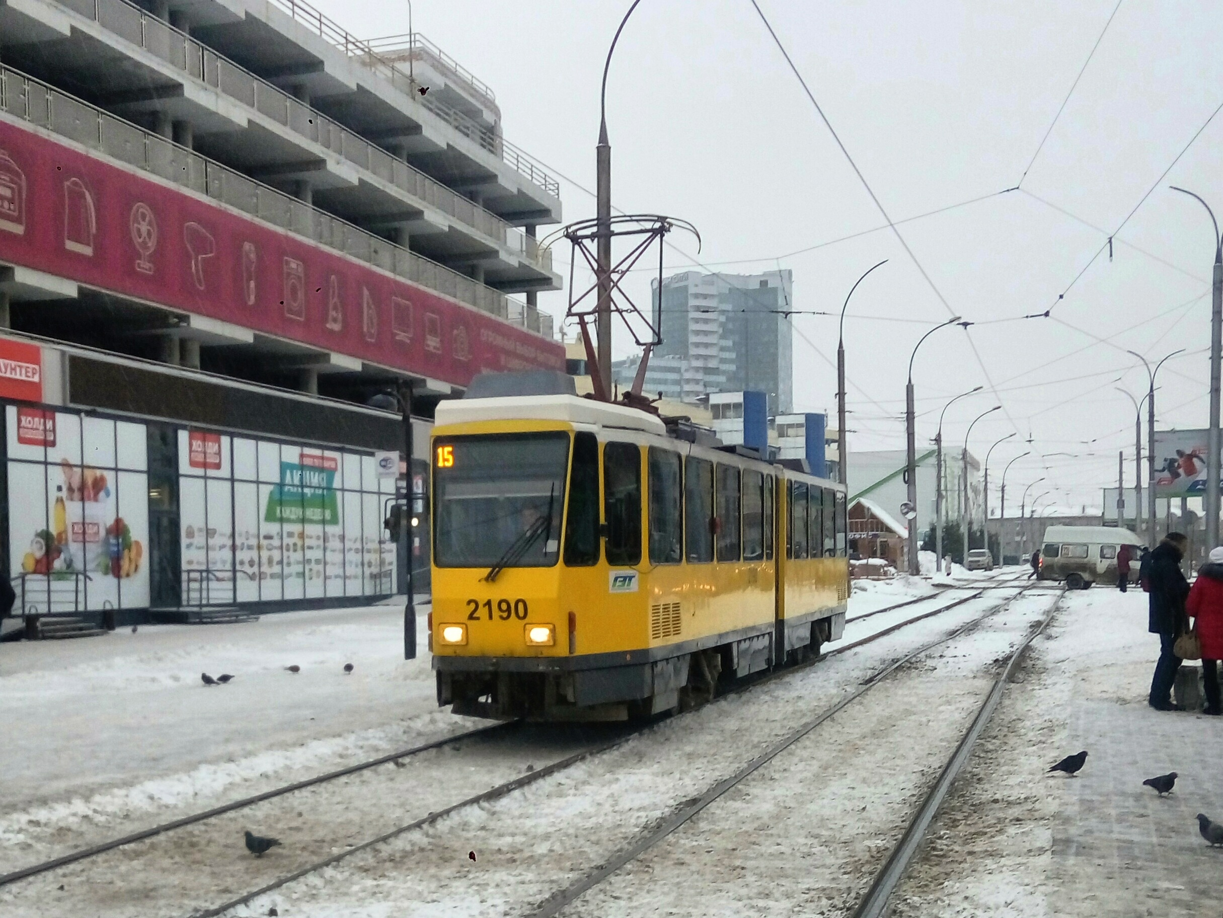 Трамвай Tatra-KT4DM в Новосибирске на 15-м маршруте